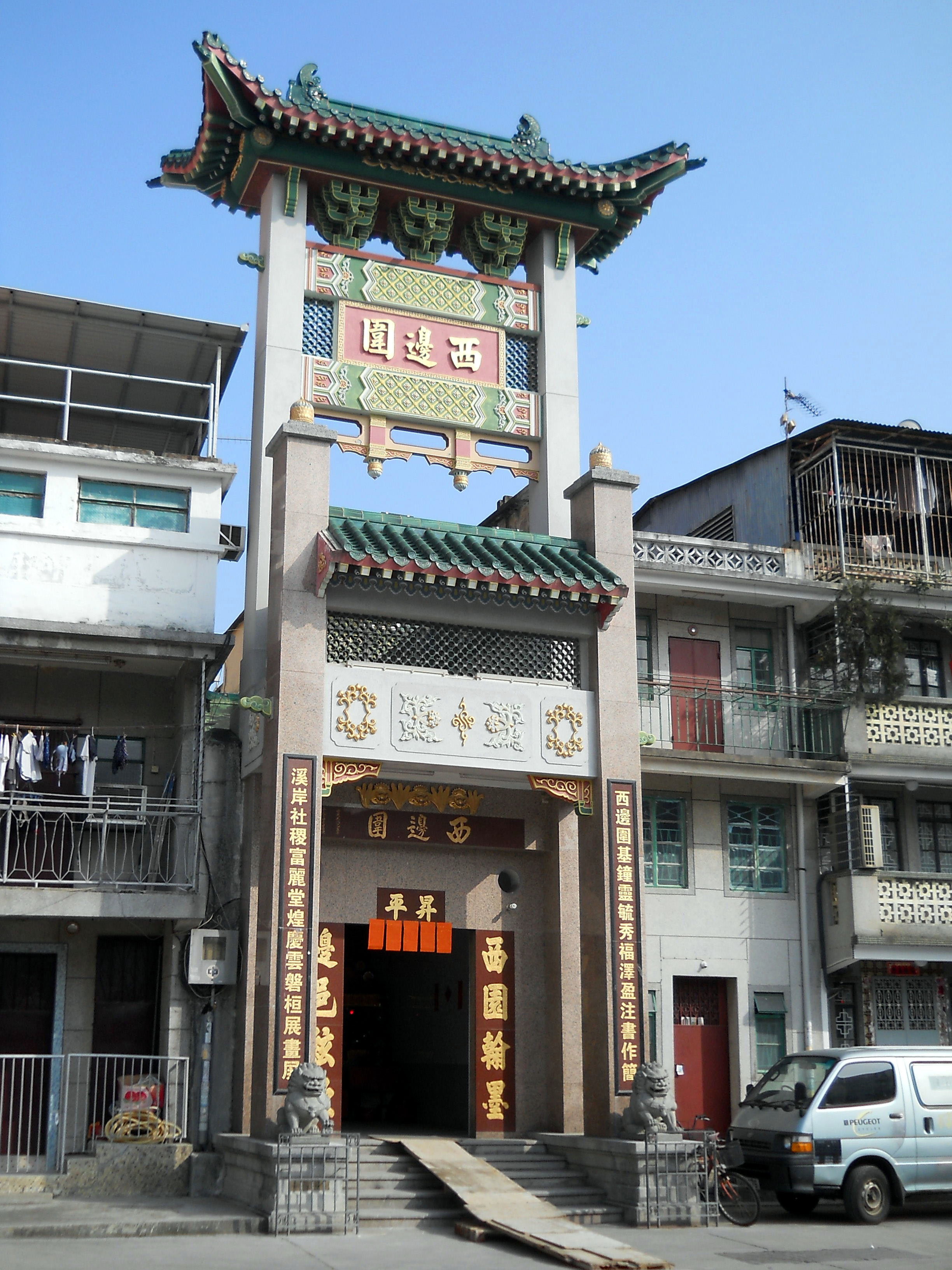 中文（香港）: 西邊圍